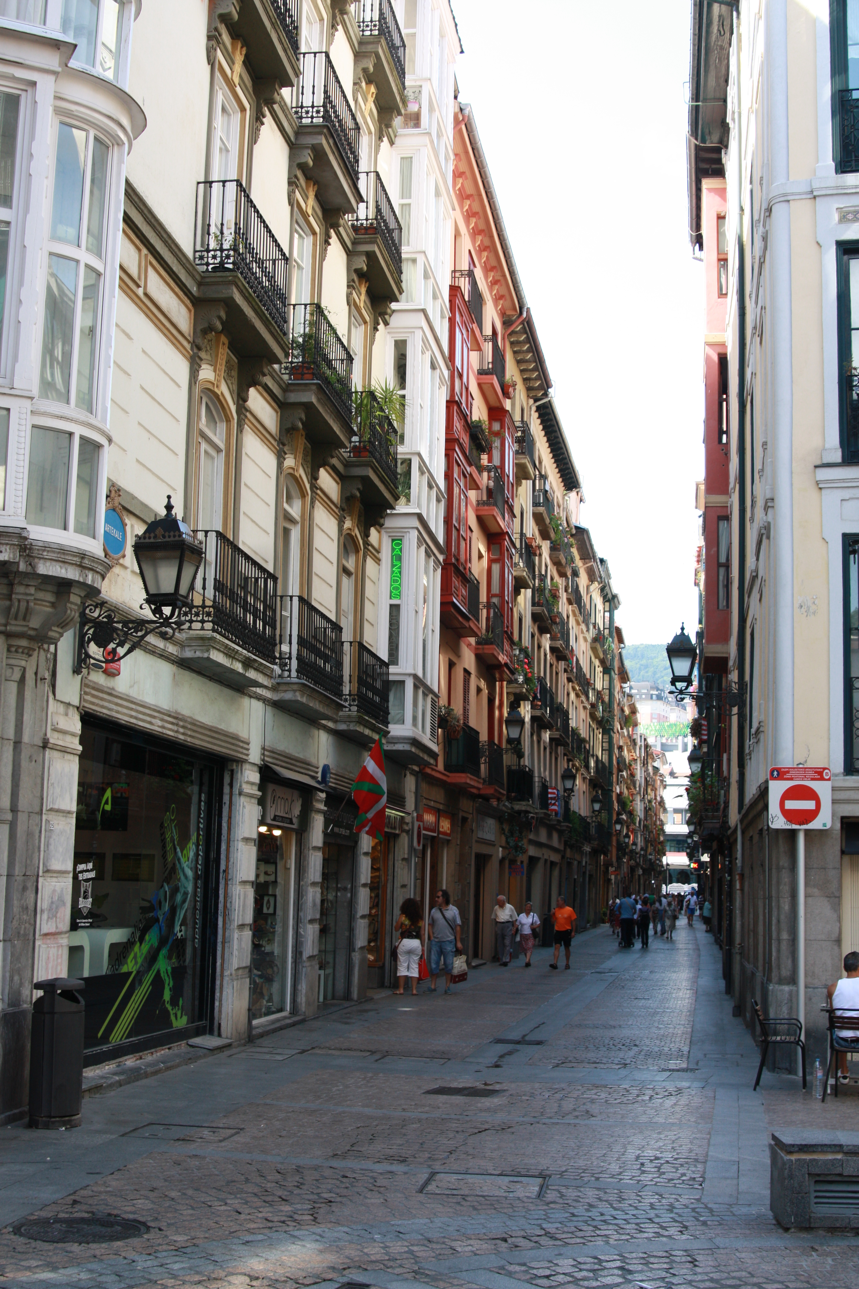 Callejeando